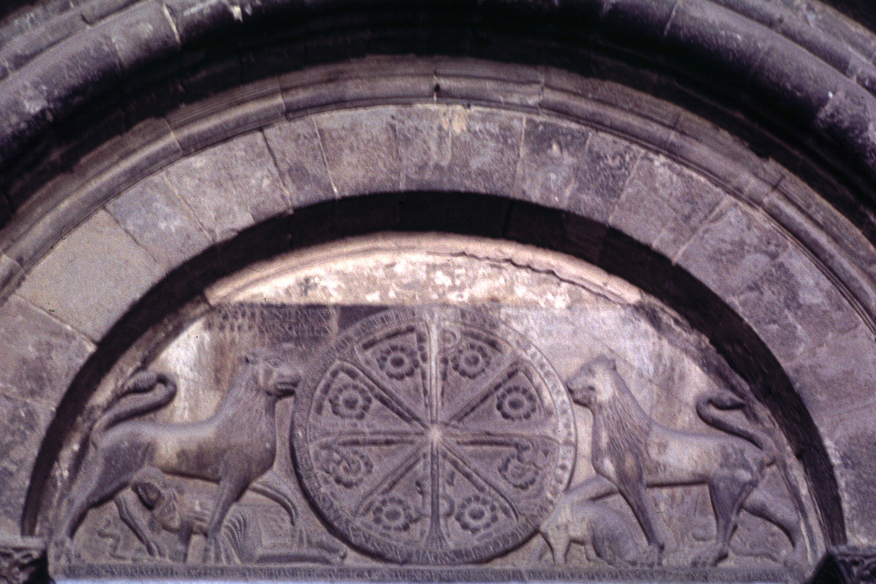 Jaca, Catedral de San Pedro - Crismón de San Pedro